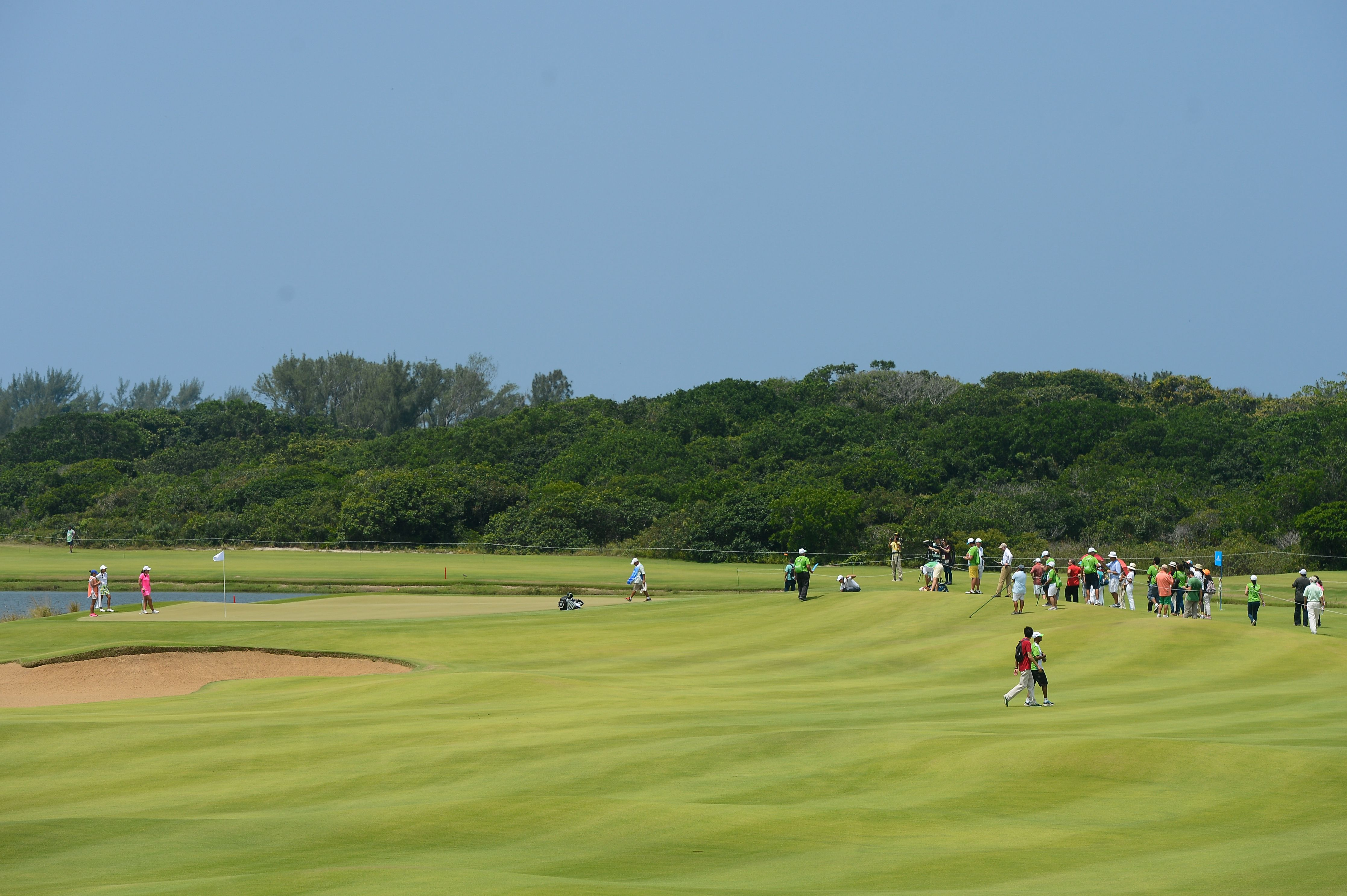 Rio de Janeiro - Evento-teste de golfe para os Jogos Rio 2016, com participação de nove atletas brasileiros, no Campo Olímpico de Golfe, que será usado em competição pela primeira vez (Tânia Rêgo/Agência Brasil)